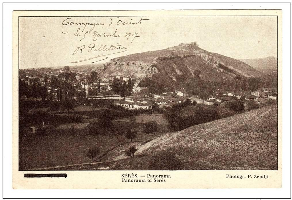 Сяр през Първата световна война